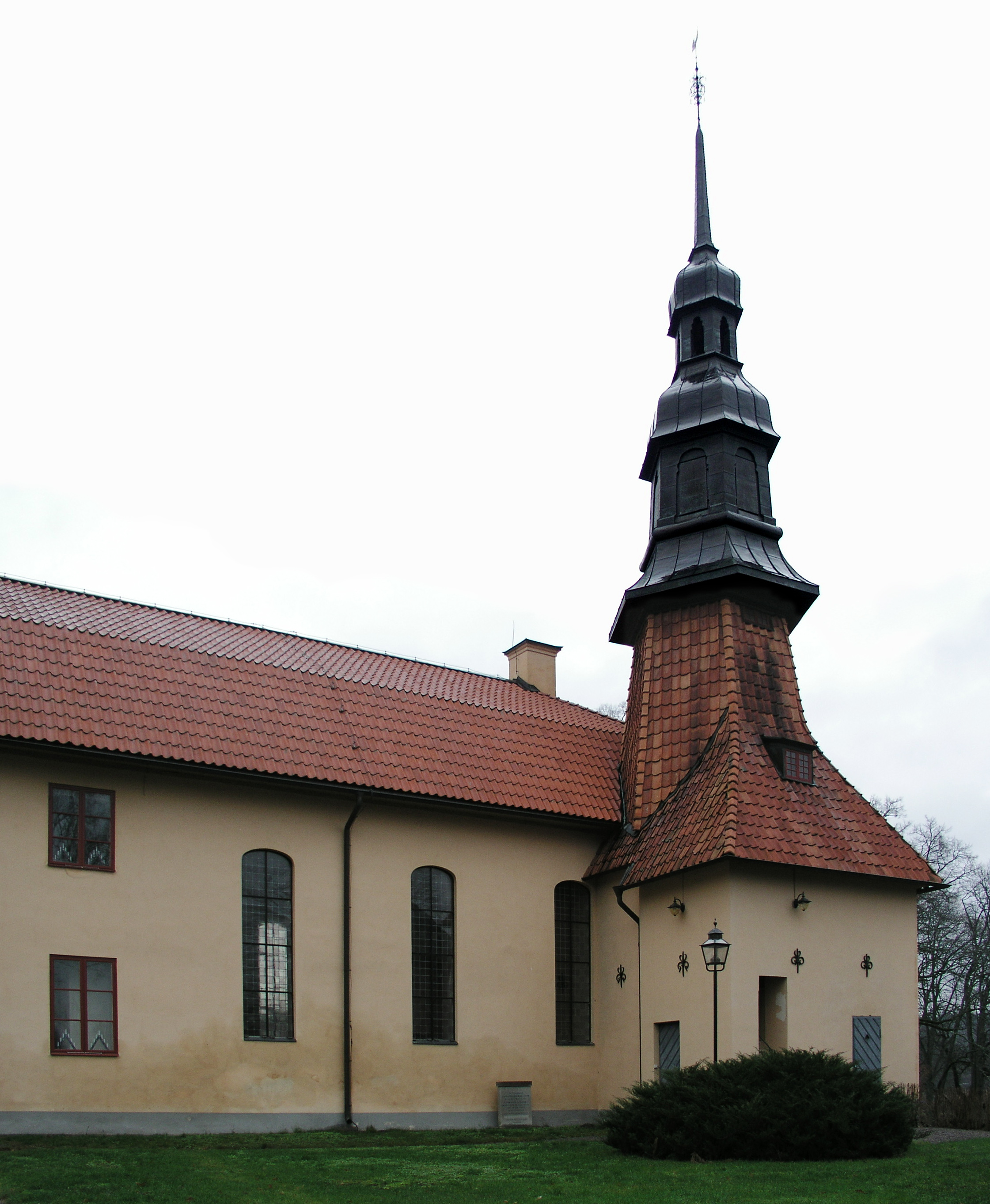 Stjärnorp church, Diocese of Linköping, Linköpings kommun, Sweden